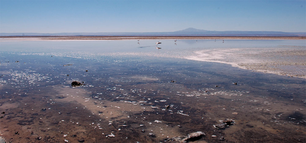 Soncor ist ein System von Seen und Vegetationsflächen im östlichen Sektor des Salar de Atacama, ca. 24 km von Toconao entfernt. Der 50 km² große Sektor Soncor ist Teil des Naturschutzreservates Reserva Nacional Los Flamencos. Der Salar de Atacama hat eine Fläche von 3200 km² und befindet sich auf einer Höhe von 2300 m ü.d.M. Auf seiner Oberfläche sieht man Salzkrusten, hervorgerufen durch die konstante Bildung und Anhäufung von Kristallen, welche sich im unterirdischen, stark salzhaltigen Wasser aus den nahegelegenen Anden durch Verdampfung bilden. Besonders im östlichen Teil des meist durch unterirdirsche natürliche Kanäle verbundenen Soncor-Seensystems kann man verschiedene Vogelarten, darunter die Andemöwe und den Andenflamingo beobachten.